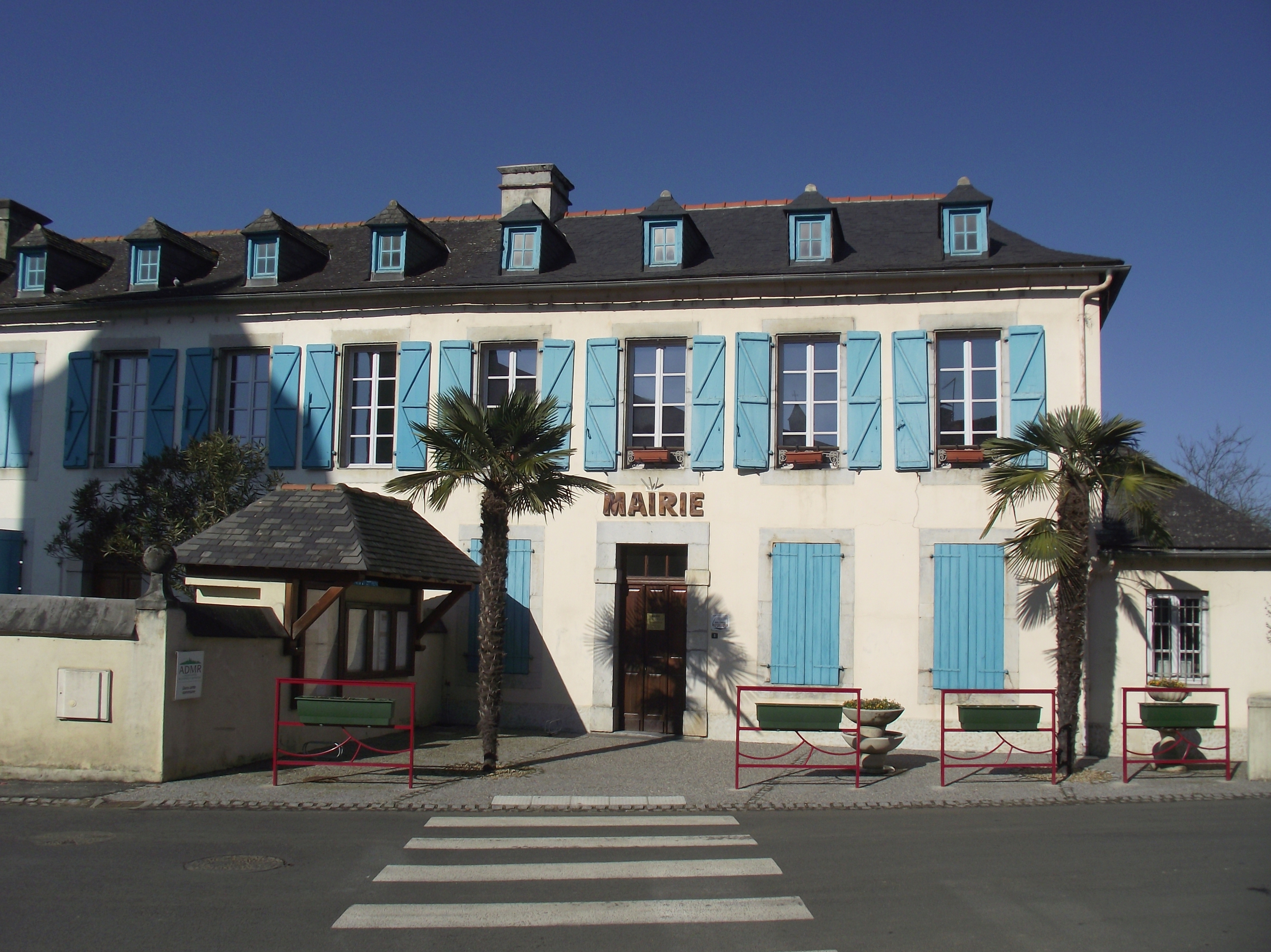 Mairie de Bénac (Hautes-Pyrénées, France)